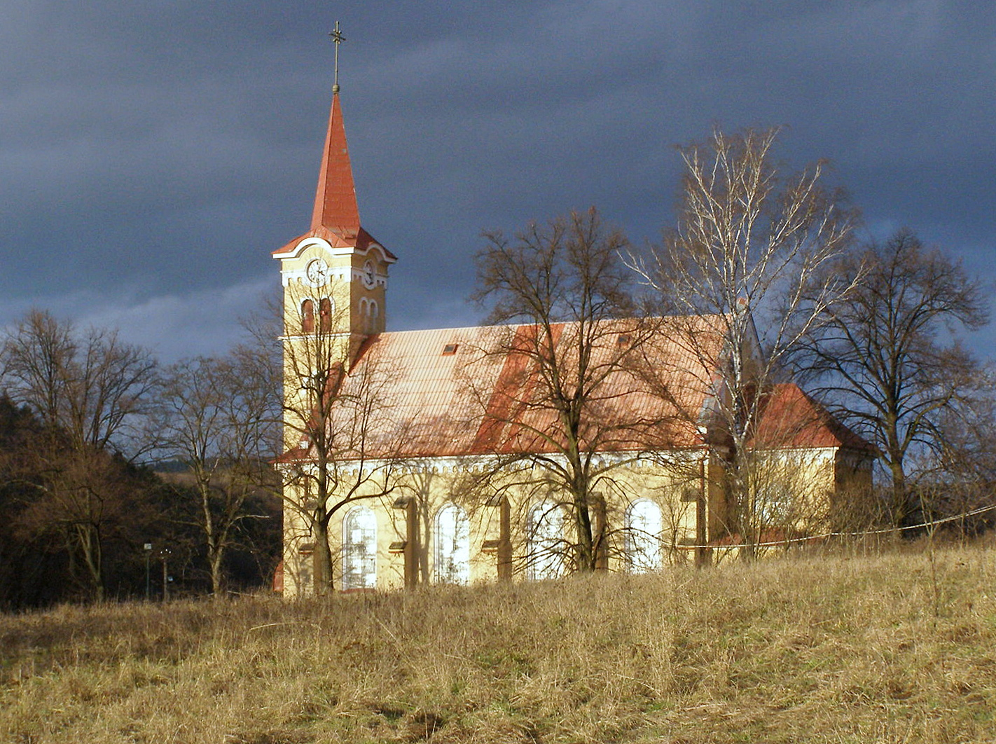 Hlubočky - kostel Božského Srdce Páně